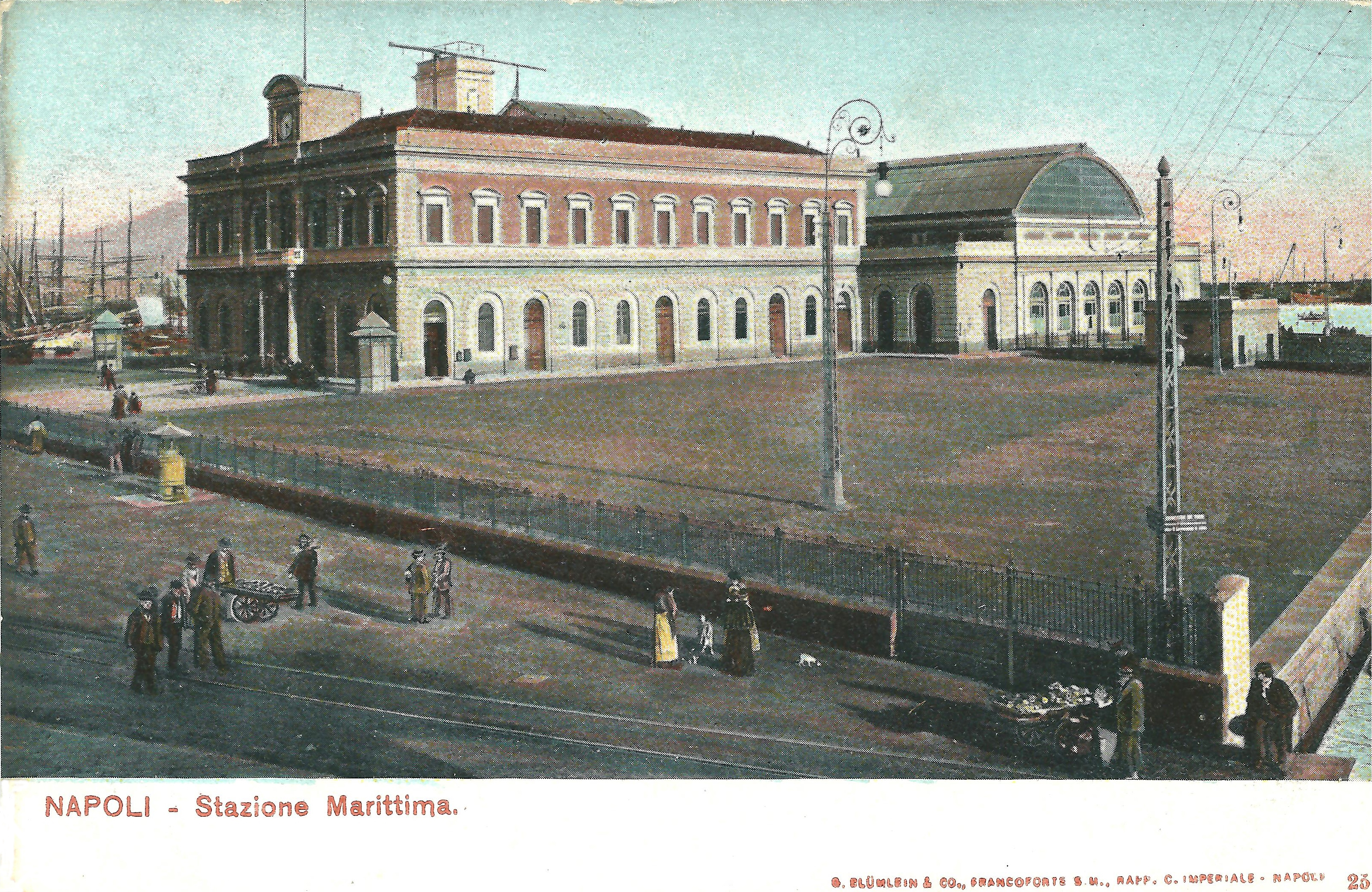 Maritiem station in Napels op een oude briefkaart